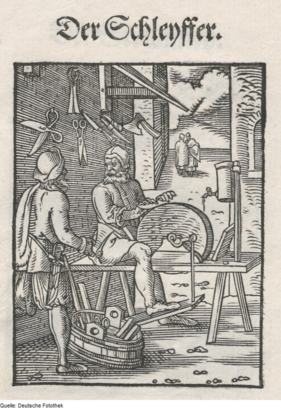 Original image description from the Deutsche FotothekStändebuch & Handwerk & Schleifer